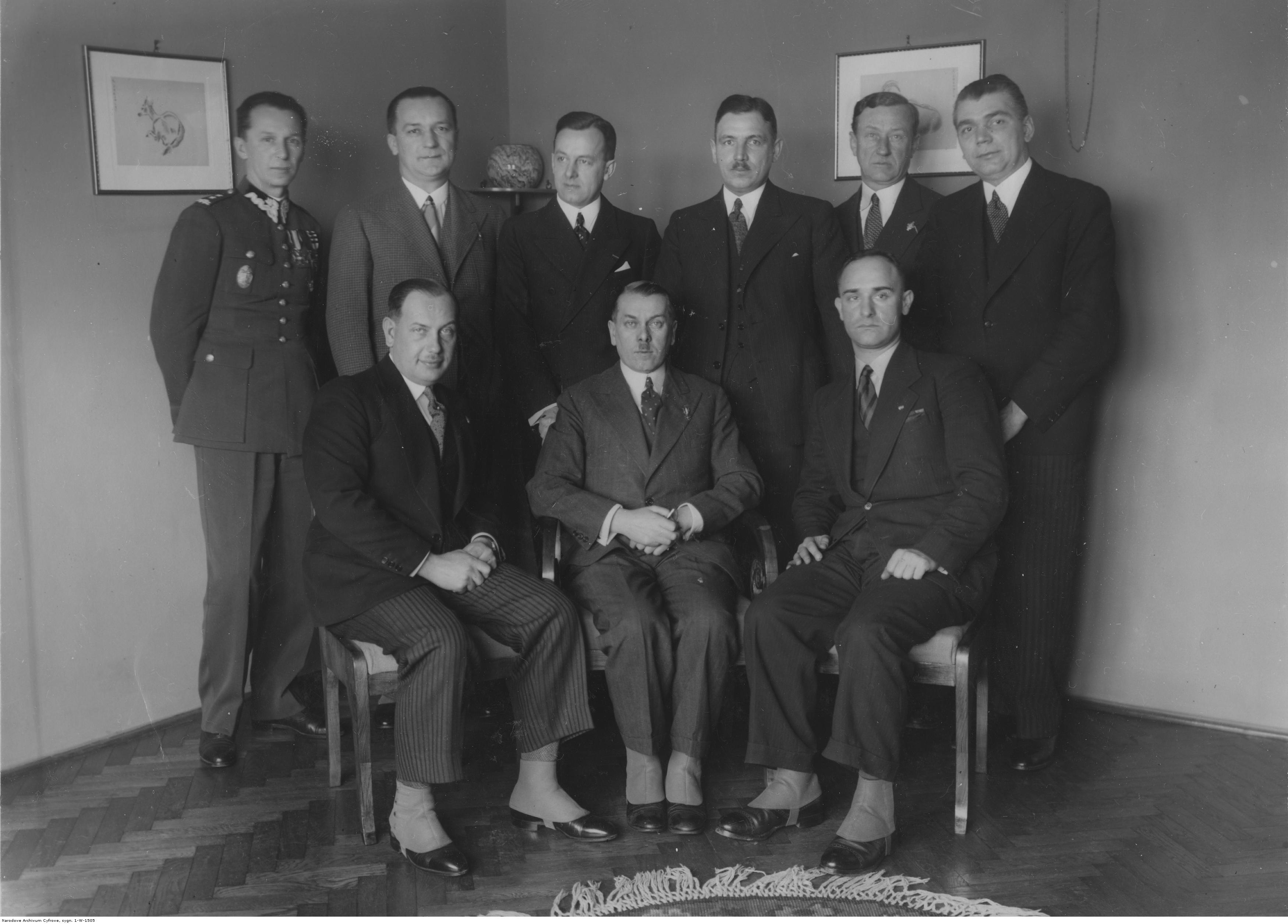 Zarząd koła byłych żołnierzy 8 Pułku Artylerii Lekkiej z Płocka w Warszawie; luty 1935 r. Siedzą od lewej: J. Baudoin de Courtenay, prezes W. Późniak, sekretarz B. Wyżnikiewicz; stoją ppłk Stanisław Tatar, inż. J. Różański, K. Górecki, A. Kownacki, W. Budziakowski, A. Śniegoski. Koncern Ilustrowany Kurier Codzienny - Archiwum Ilustracji. Sygnatura: 1-W-1505